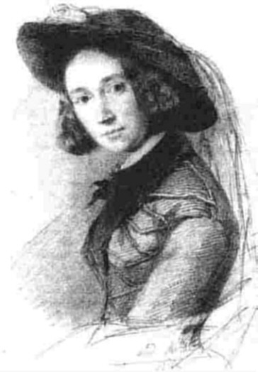 Emma Herwegh